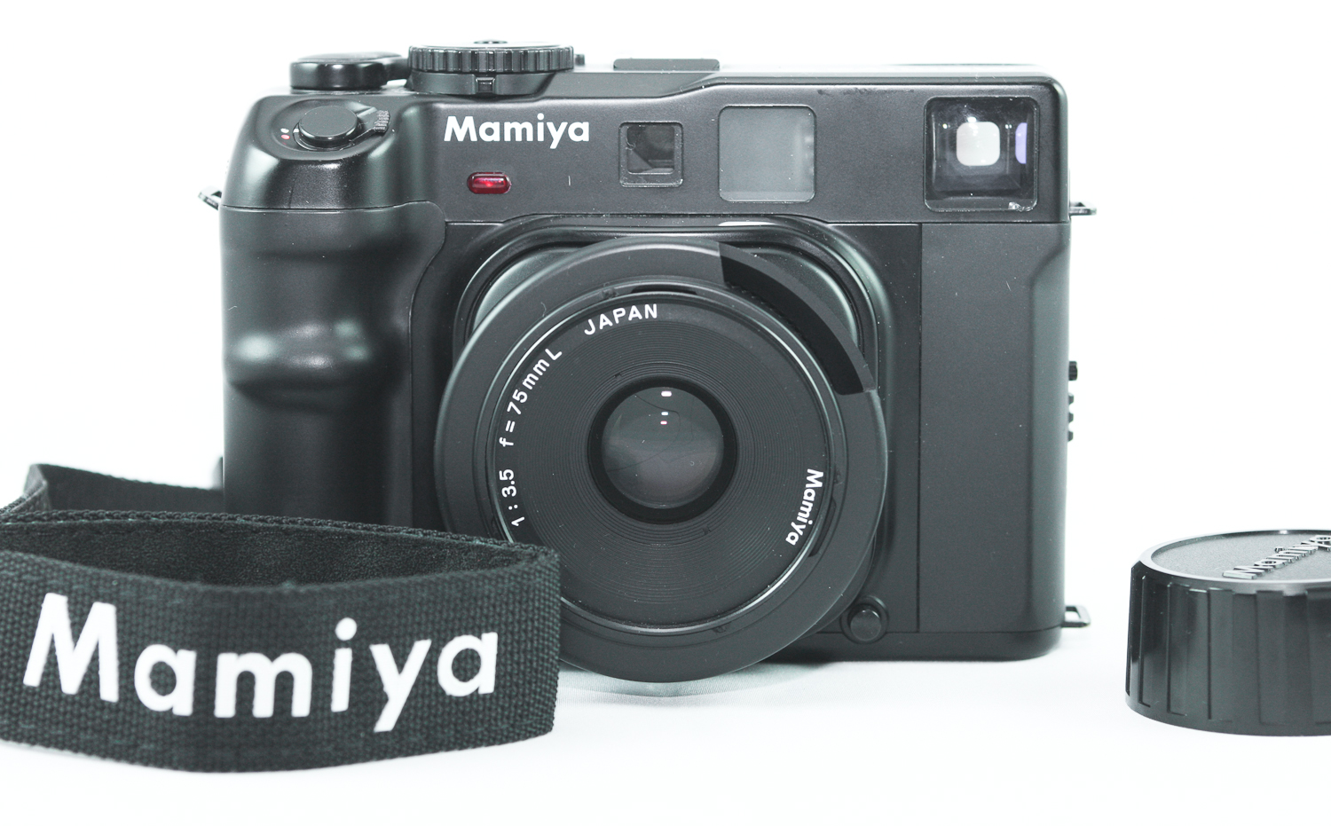 0327 Mamiya 6 75mm f3.5